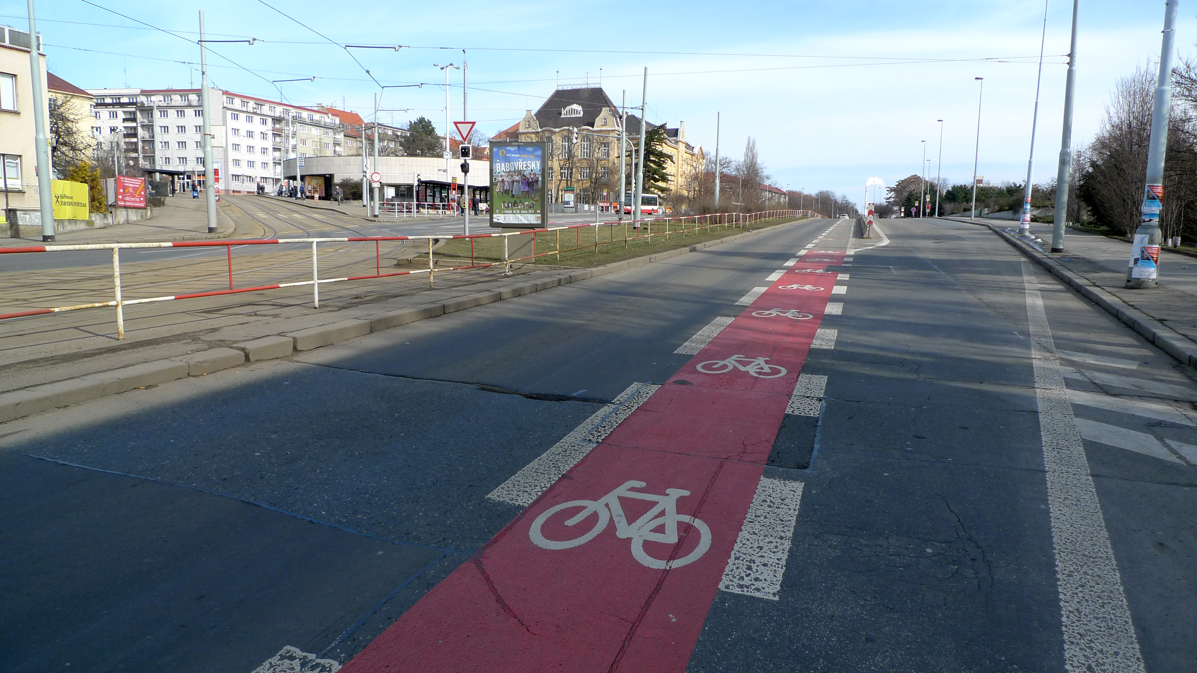 Praha 10: ulice V olšinách s cyklopruhem, v pozadí nová strašnická škola.